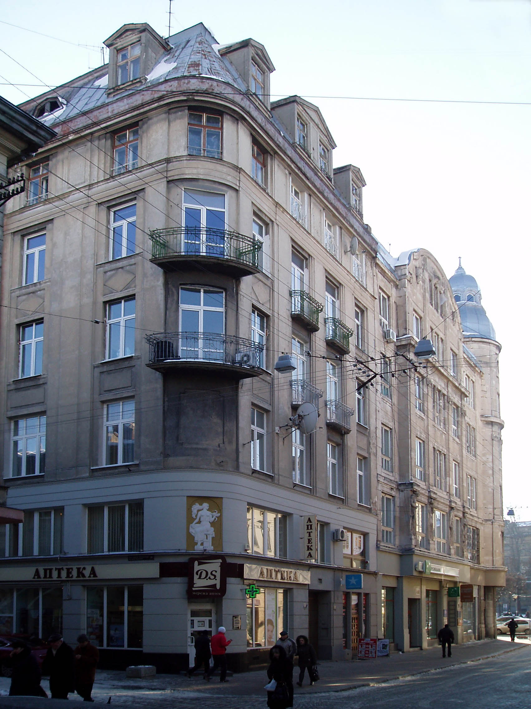 Будинки № 19 і 21 на вулиці Галицькій у Львові. Зведені за проектом Альфреда Захаревича (1871-1937) та Юзефа Сосновського (1865- після 1918).